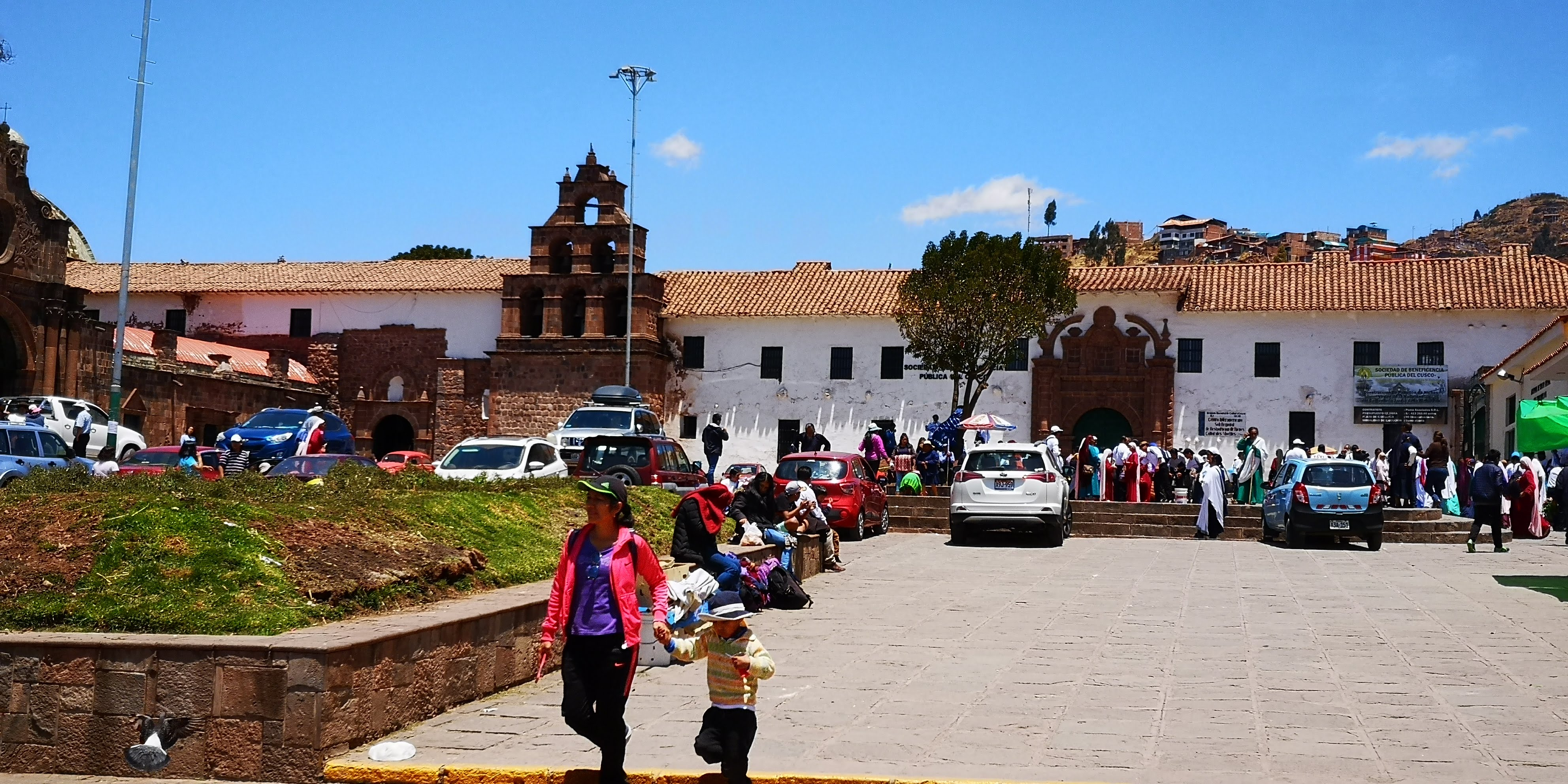 Vista de la Plazoleta de la Almudena y del templo en Cusco, Perú.